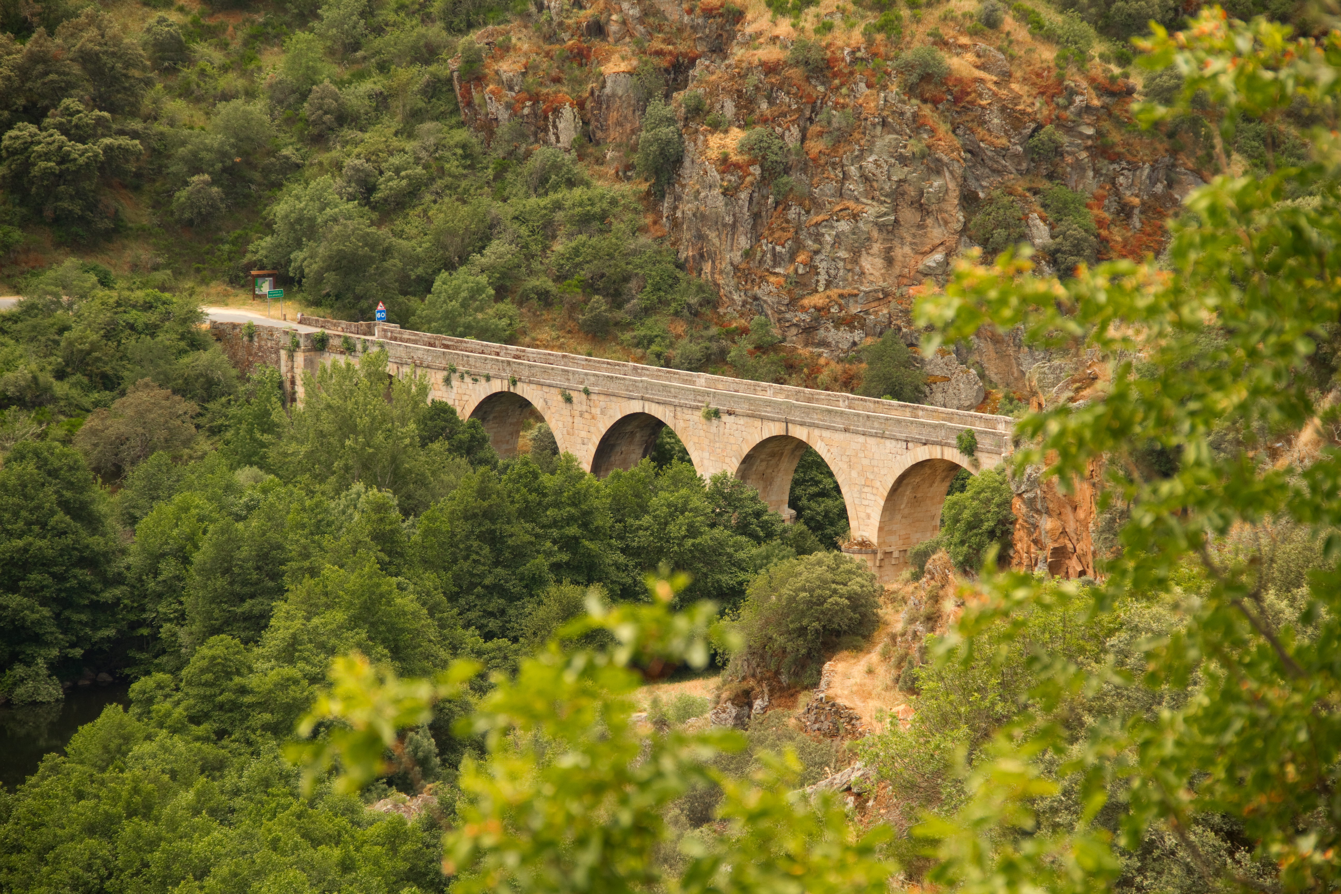 Puente de San Lorenzo sobre el río Tormes. Une localidad zamorana de Fermoselle con la salmantina de Trabanca.